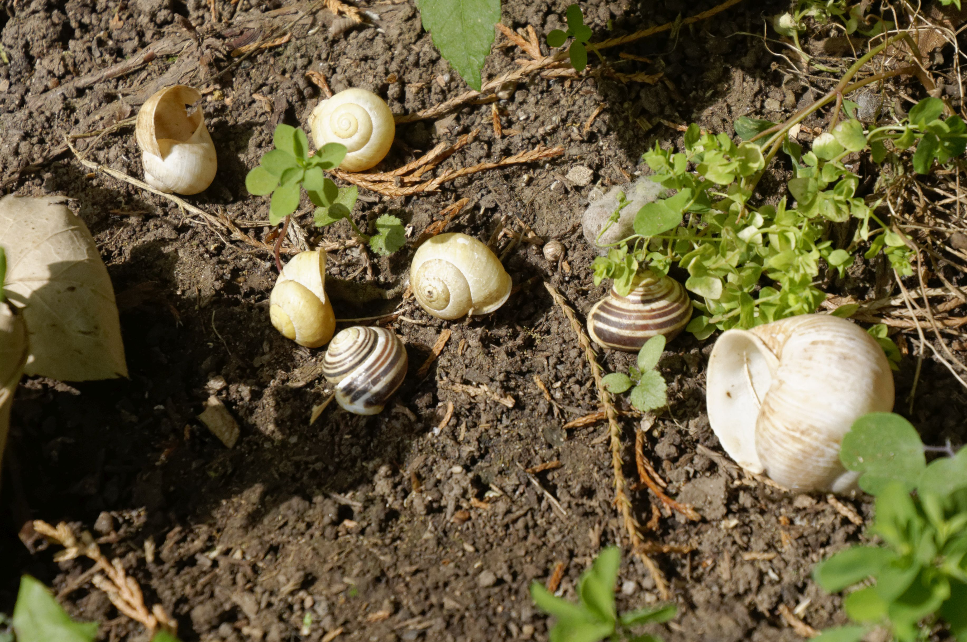 Nisthilfe leere Schneckenhäuser